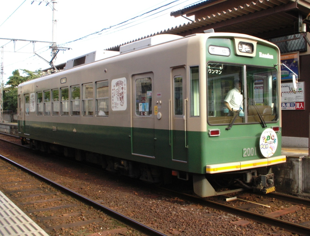 京福電気鉄道モボ2001形電車